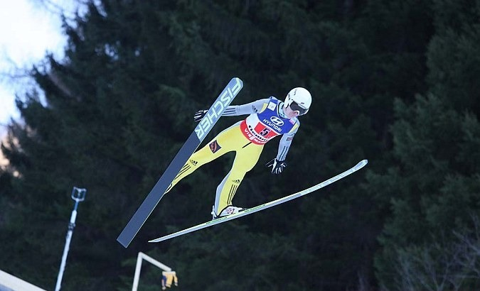 Konkurs drużynowy mężczyzn na skoczni K-120